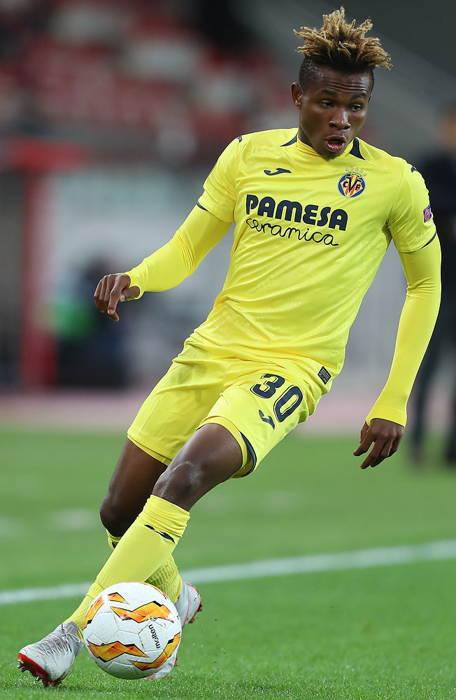 Битва на «Открытие-Арене». «Спартак» поделил очки с «Вильярреалом»